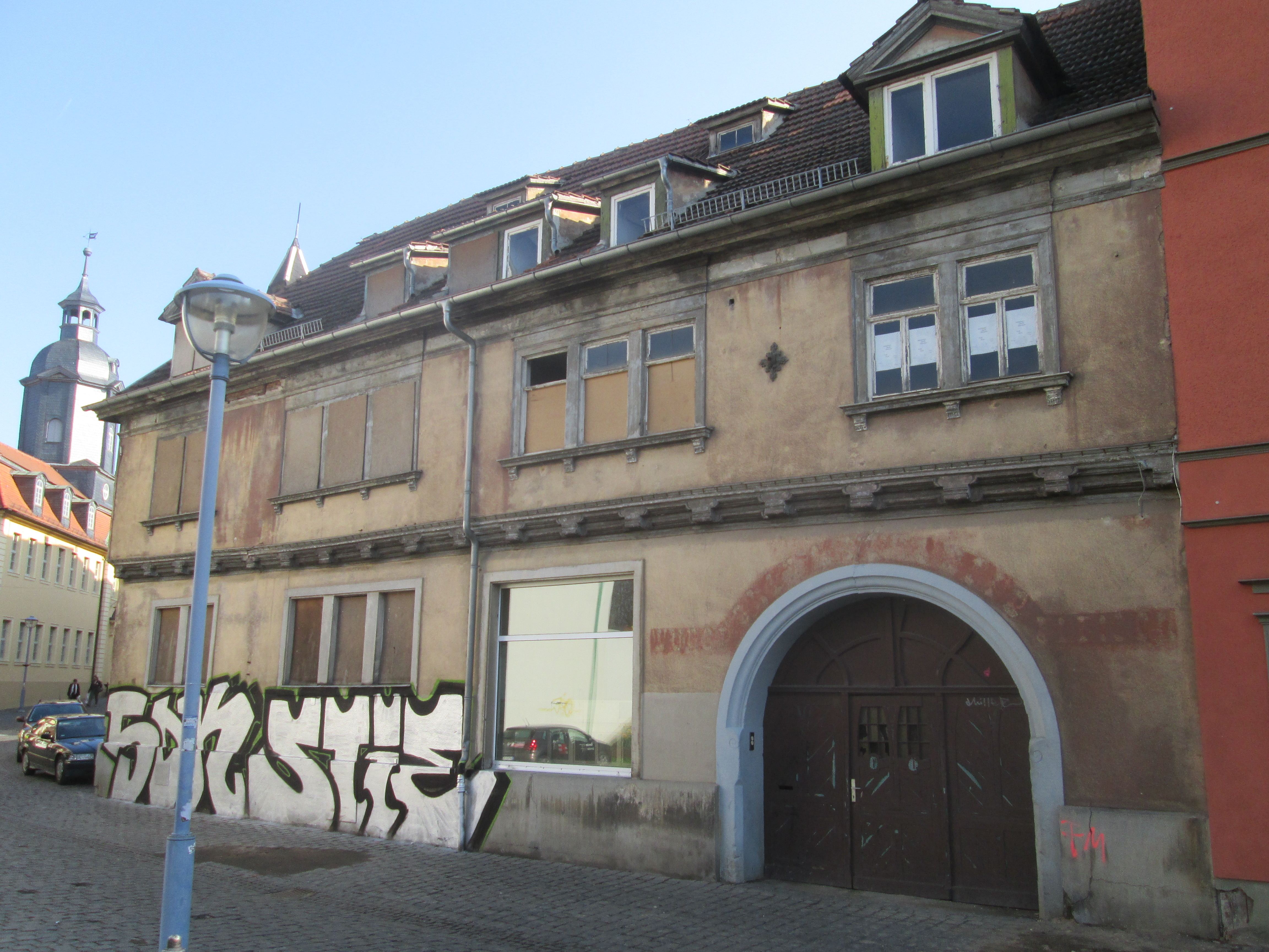 Wohnhaus